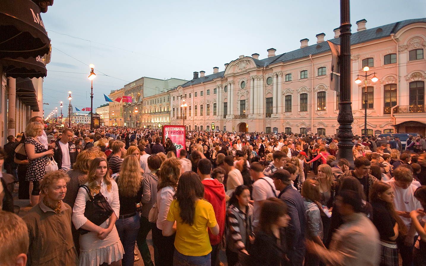 Алые паруса 2008 (Санкт-Петербург)